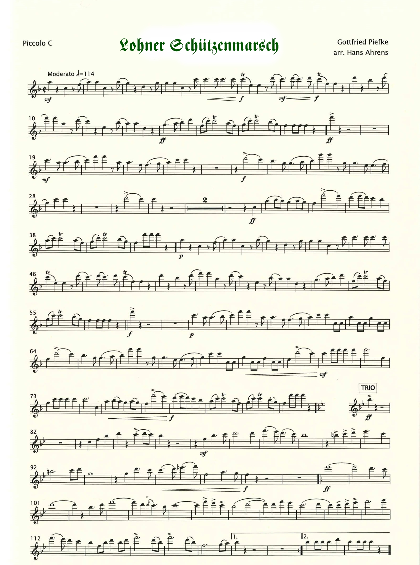 Partitur des Lohner Schützenmarsches von Gottfried Piefke, Arrangemet von Hans Ahrens